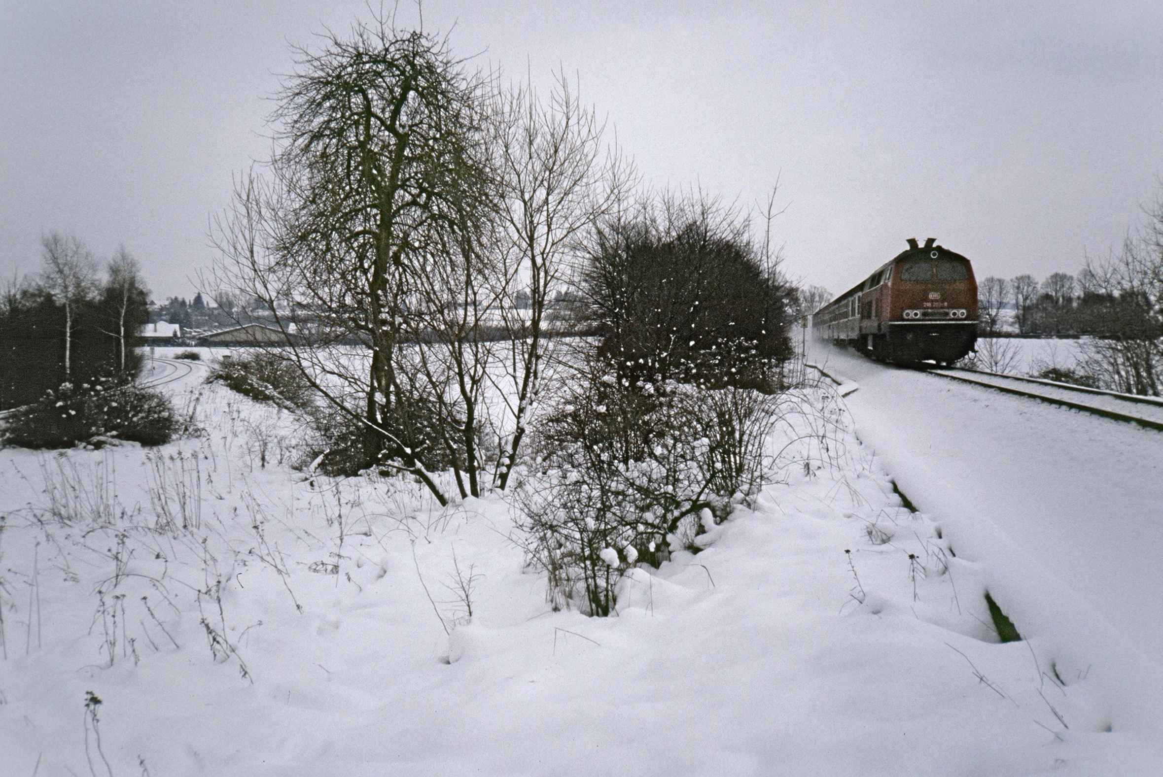 Bayreuth Abzweig Kreuzstein mit Zug auf der Fichtelgebirgsbahn